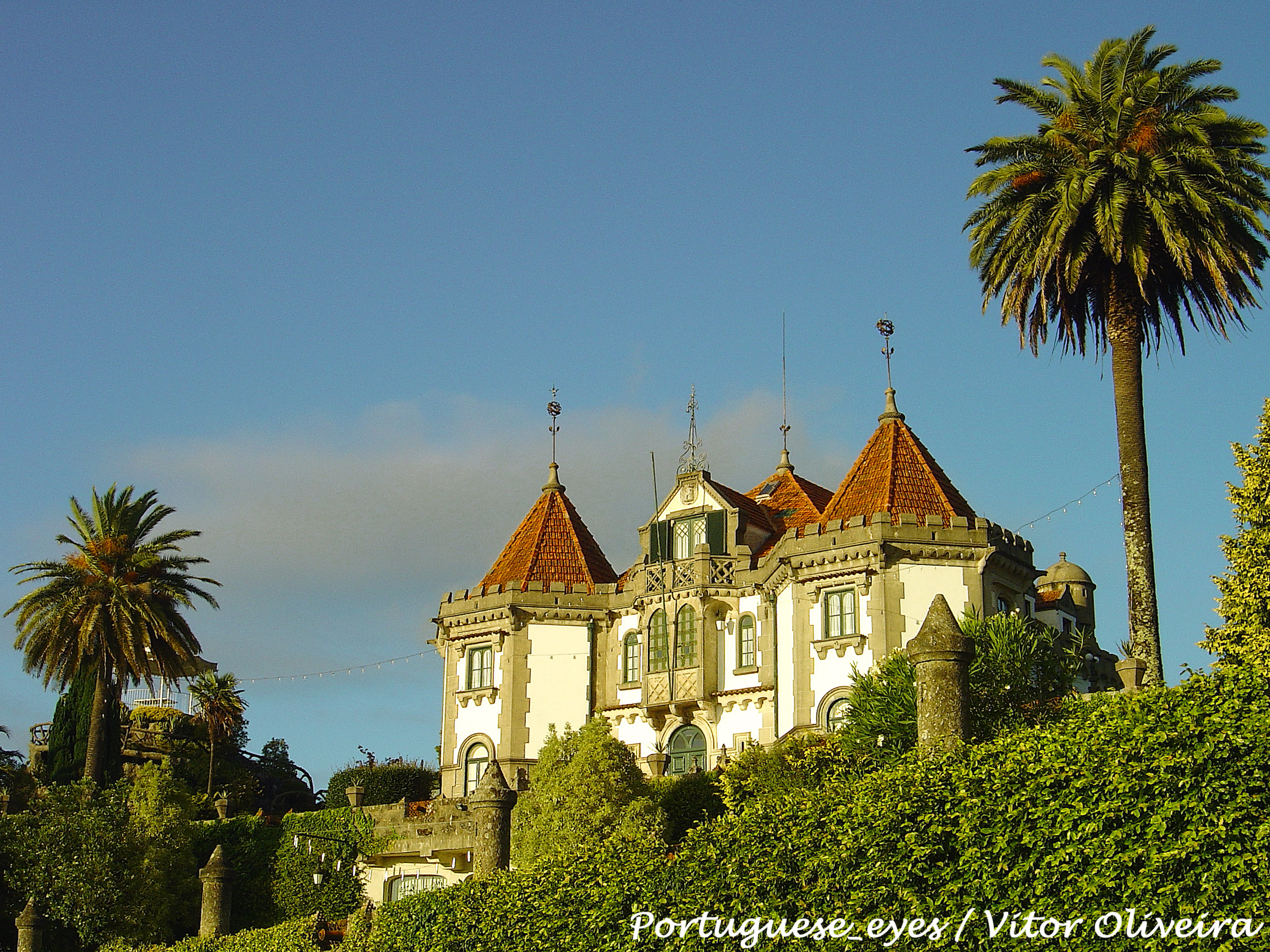 Um romântico Castelo de Fadas, do Séc. XVIII. Com o traço Néo-Gótico do Arquitecto Suíço Emest Korrodi, inspirado nos sonhos do romantismo dos séculos XVIII e XIX. Situado no cimo do Bom Jesus do Monte, com uma posição esplêndida sobre a cidade de Braga e com uma vista que se estende até ao litoral,é uma das mais belas jóias de Portugal. Mergulhado no verde luxuriante do seu parque de 3 ha com um magnífico lago, grutas, árvores com cerca de 800 anos, terraço e esplanada circundante à nova piscina sob o qual se abre a cidade: um oásis mágico de paz e beleza. Um Hotel de 4 estrelas Luxo. Com quartos e suites de características diferentes, banho privativo completo, TV satélite, telefone directo, suites com terraços e jacuzzi. Mobilado com móveis de estilo, possui diferentes espaços para os hóspedes, e encantadores lugares para descanso nos seus jardins. Um restaurante e um bar - terraço sobre a cidade. No Verão, pequeno almoço e jantar podem ser servidos no terraço do jardim. See where this picture was taken. [?]